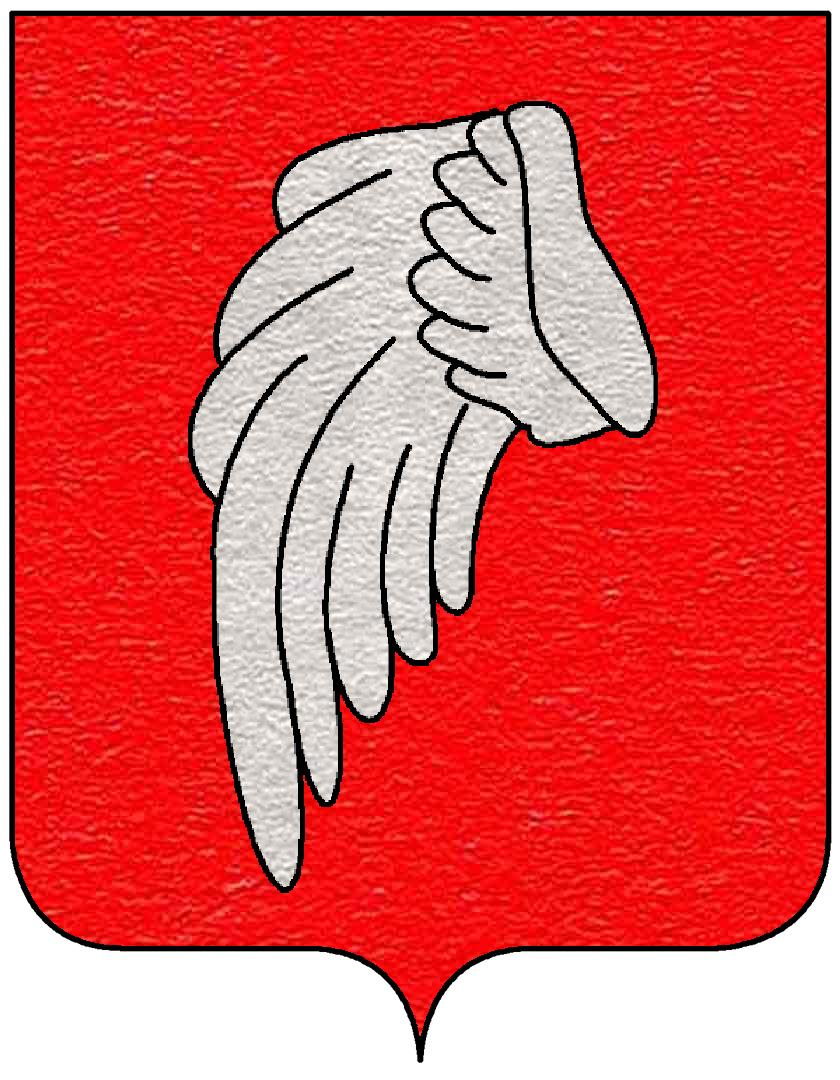 Stemma della famiglia Bevilacqua